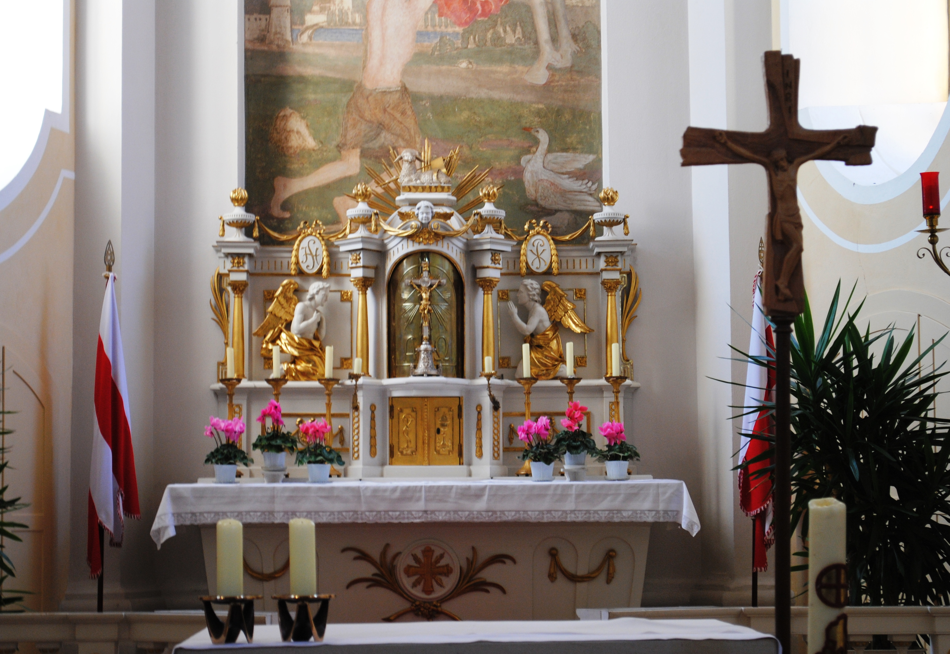 Altar, St. Martin, Willanzheim